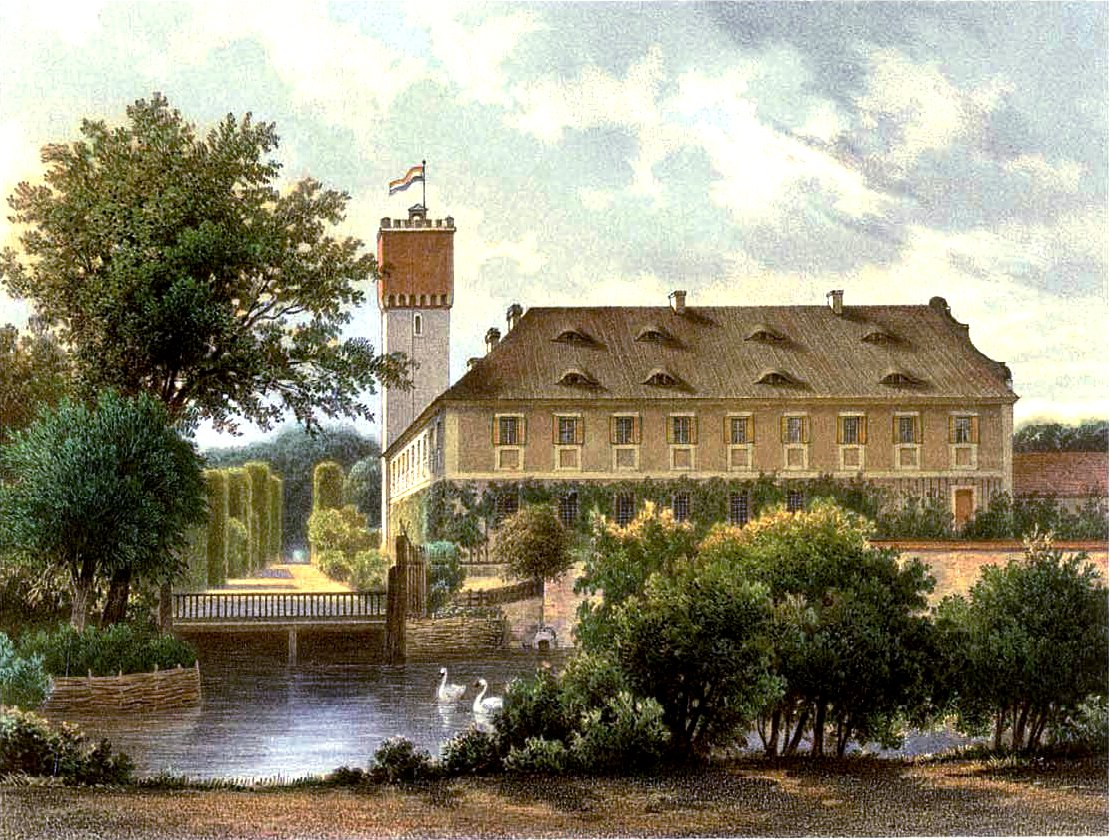 Gut Schlanz, Kreis Breslau, Provinz Schlesien